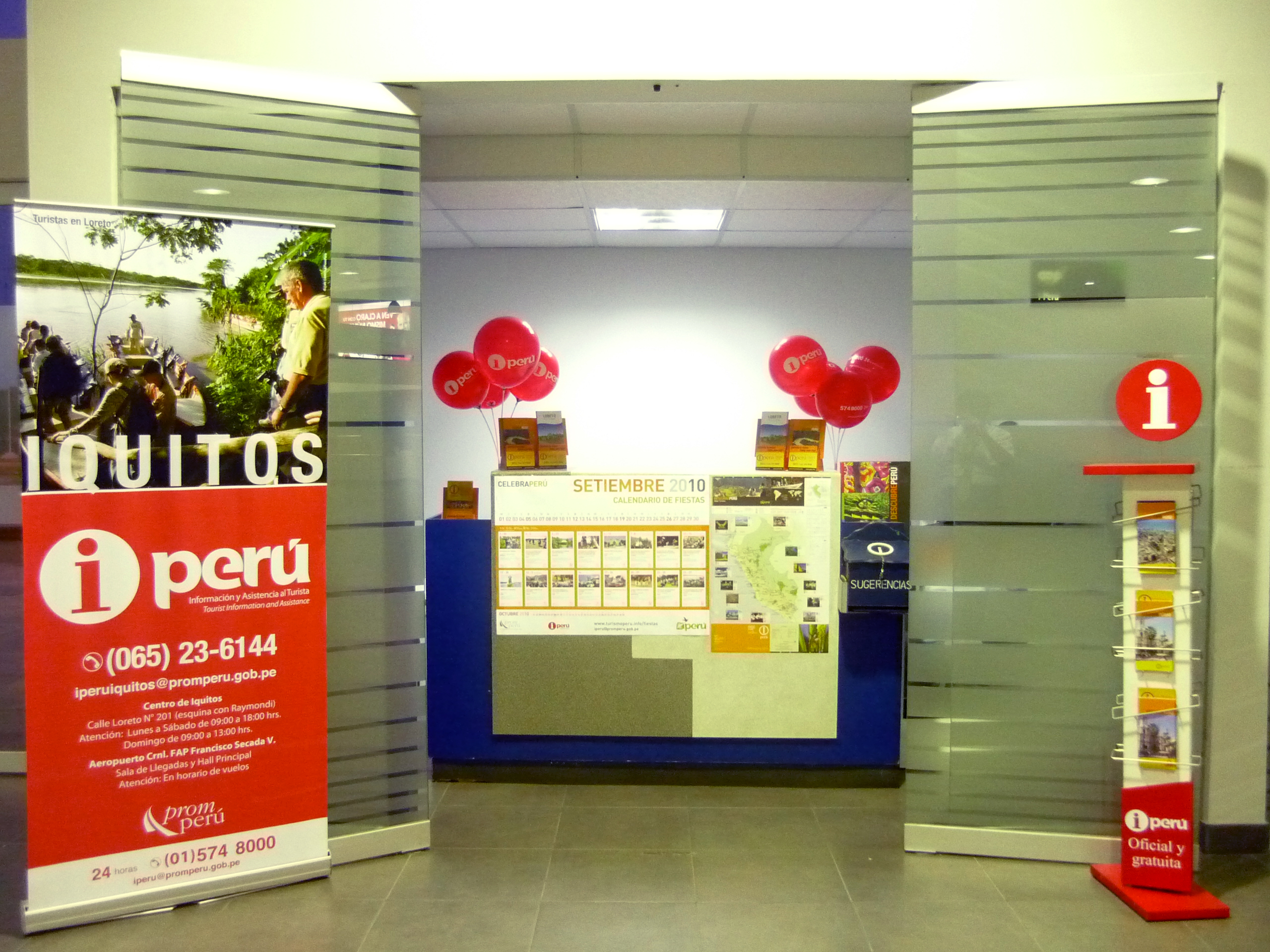 La oficina de iperú ubicada en el Aeropuerto Internacional Francisco Secada Vignetta de la ciudad amazónica de Iquitos. iperu office at the Iquitos international airport.